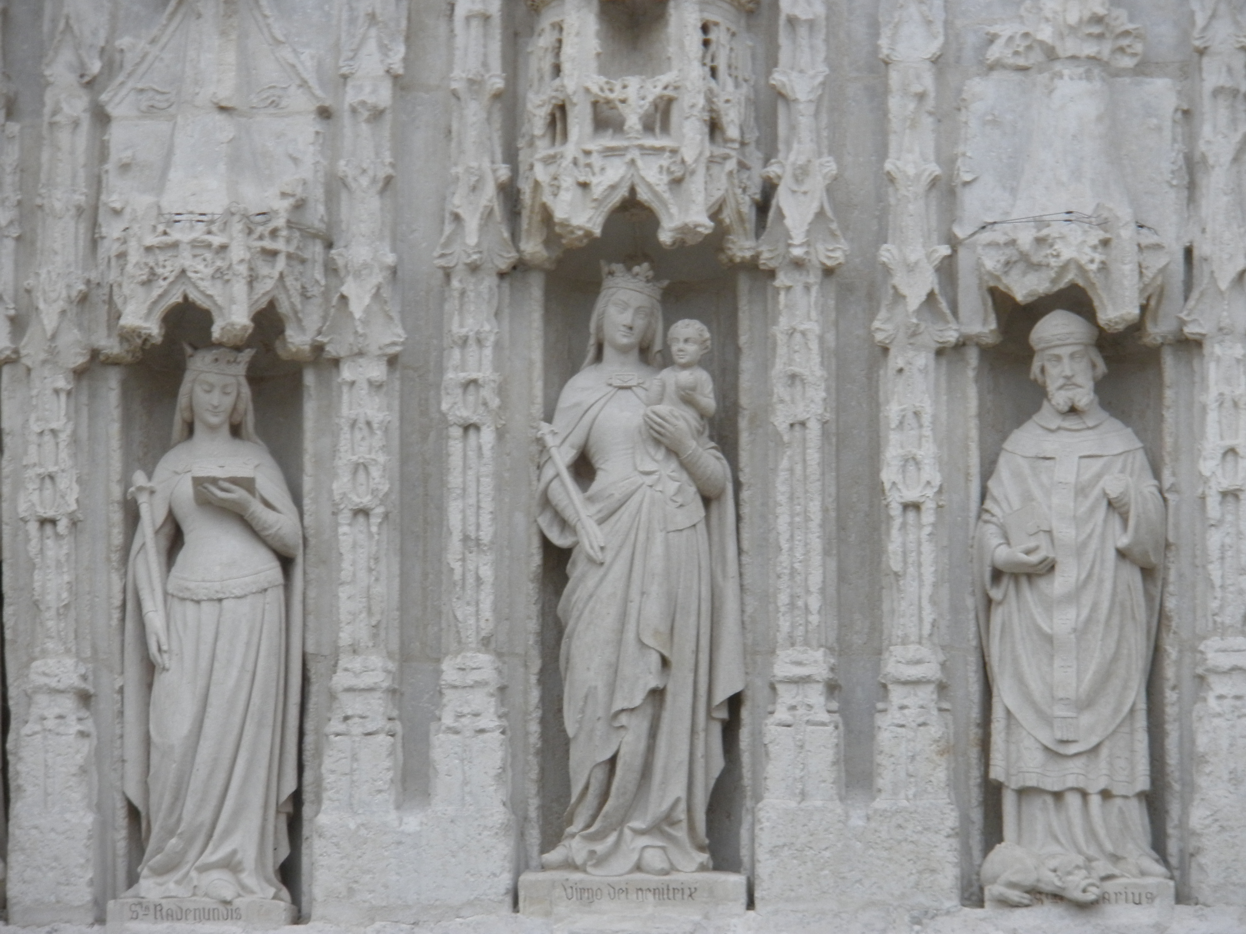 Vierge à l'enfant : détail de la façade de l'église Sainte Radegonde à Poitiers (Vienne 86)